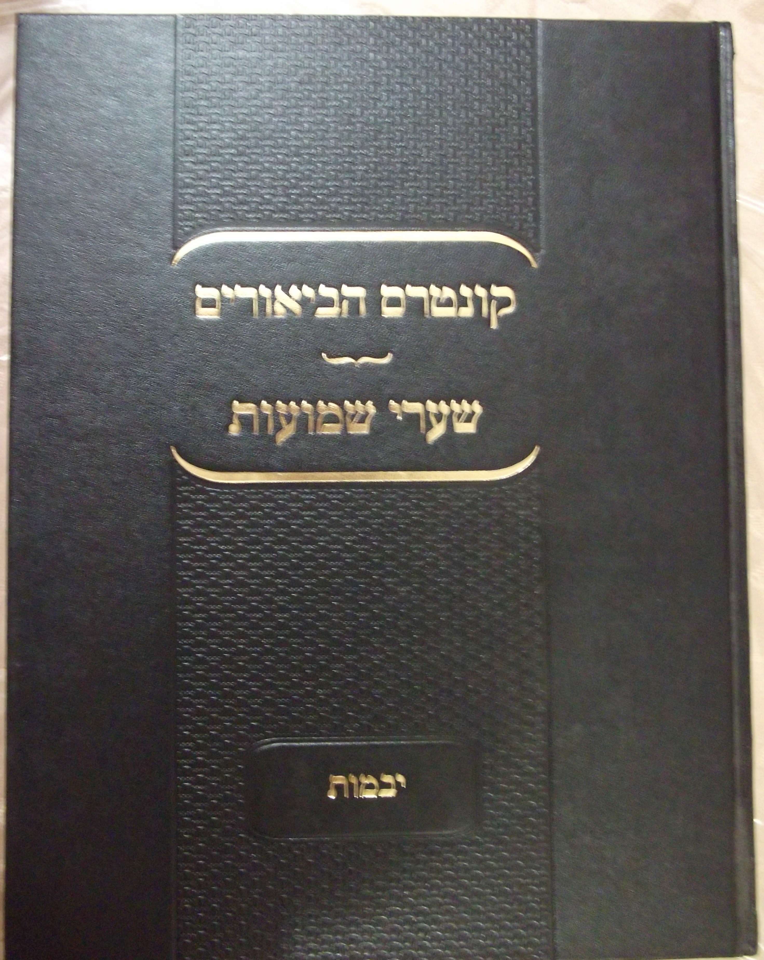 ספר קונטרס הביאורים על מסכת יבמות של הגרמ"ש שפירא